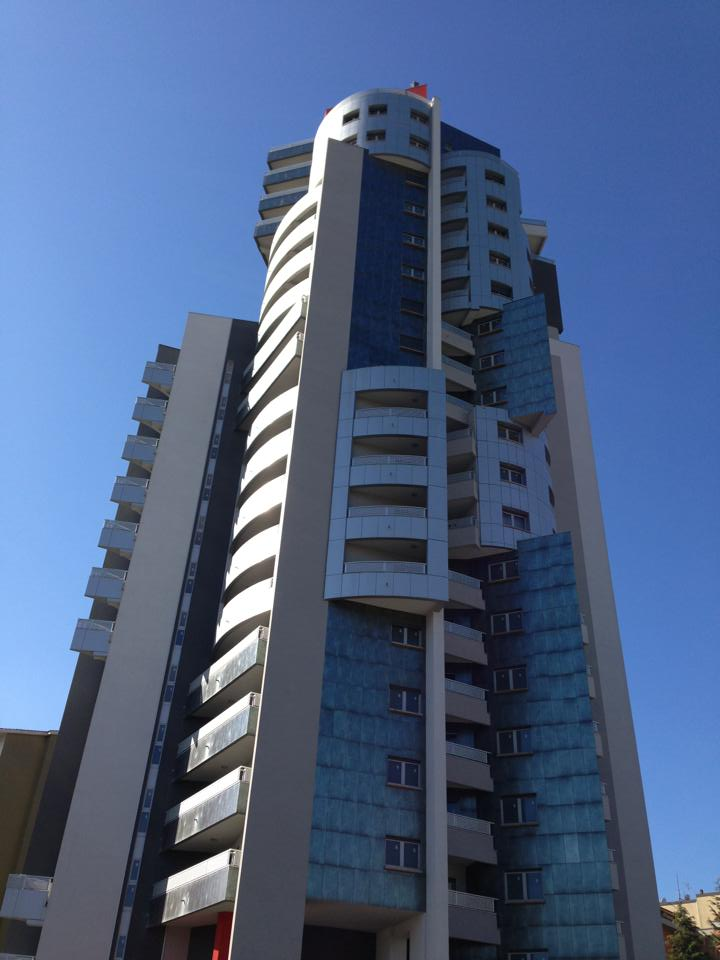 Torre Skyline a Cosenza in via Panebianco.